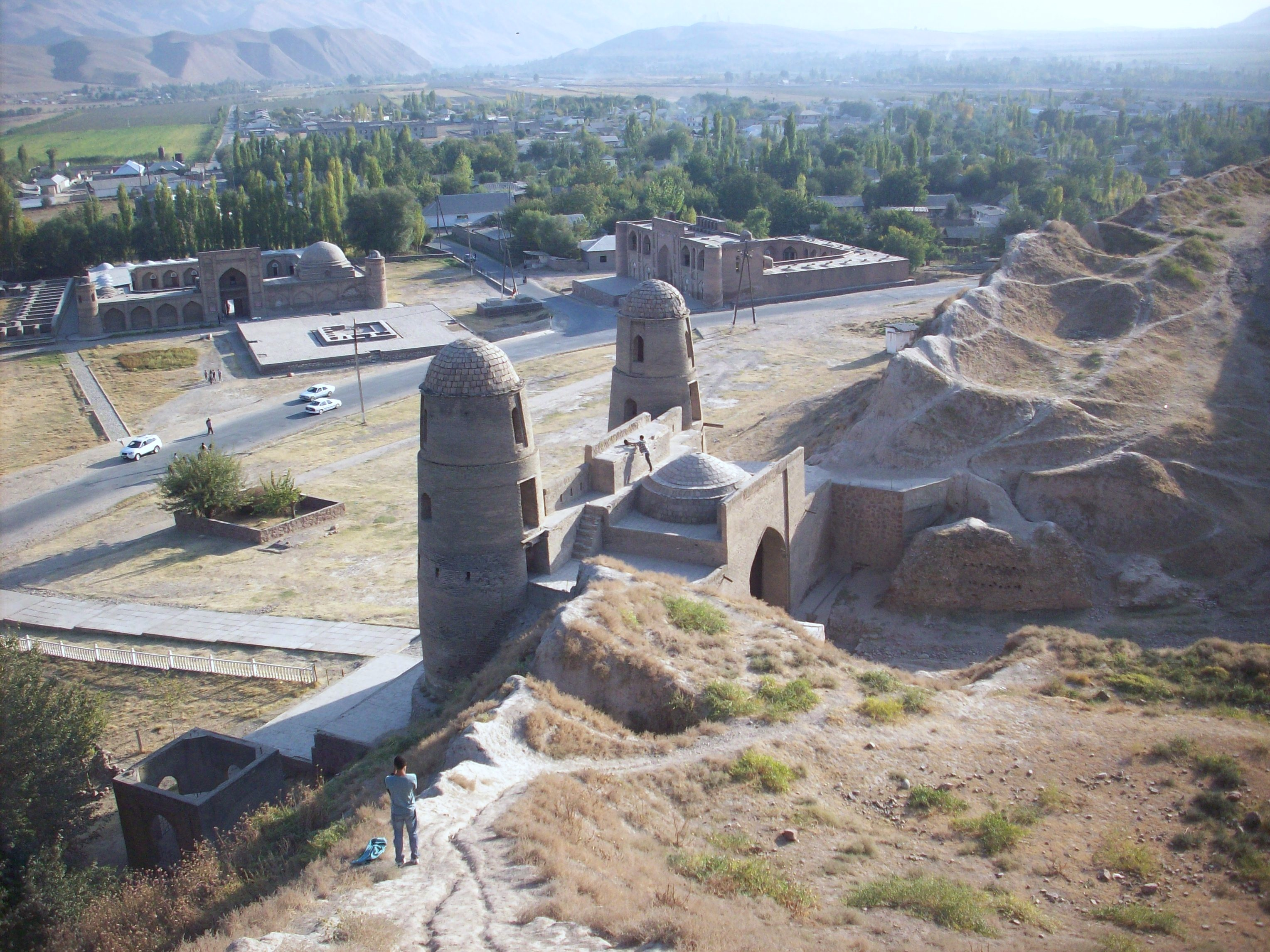 Hisor, Tajikistan